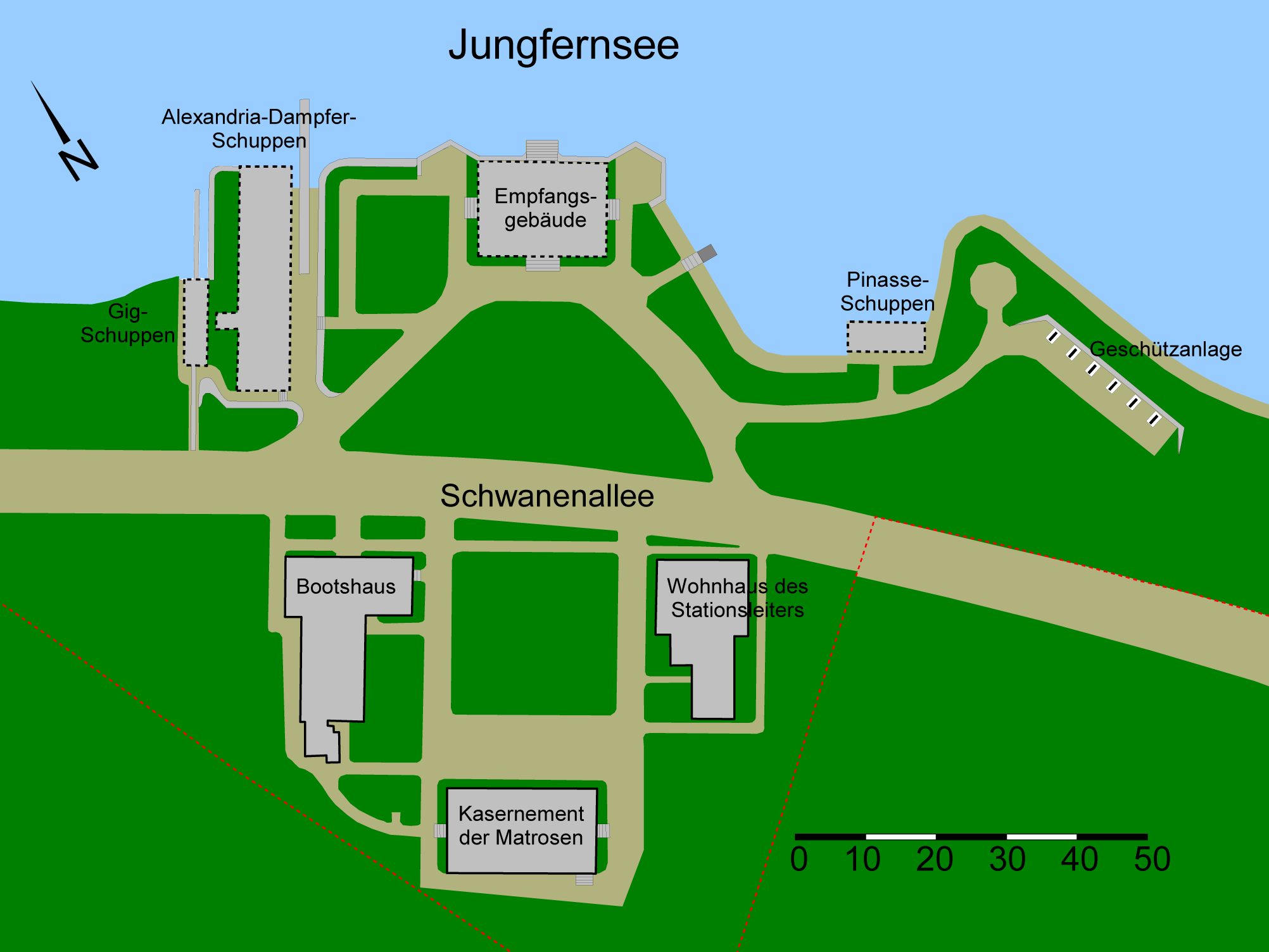 Lageplan der ehemaligen Matrosenstation Kongsnæs in Potsdam